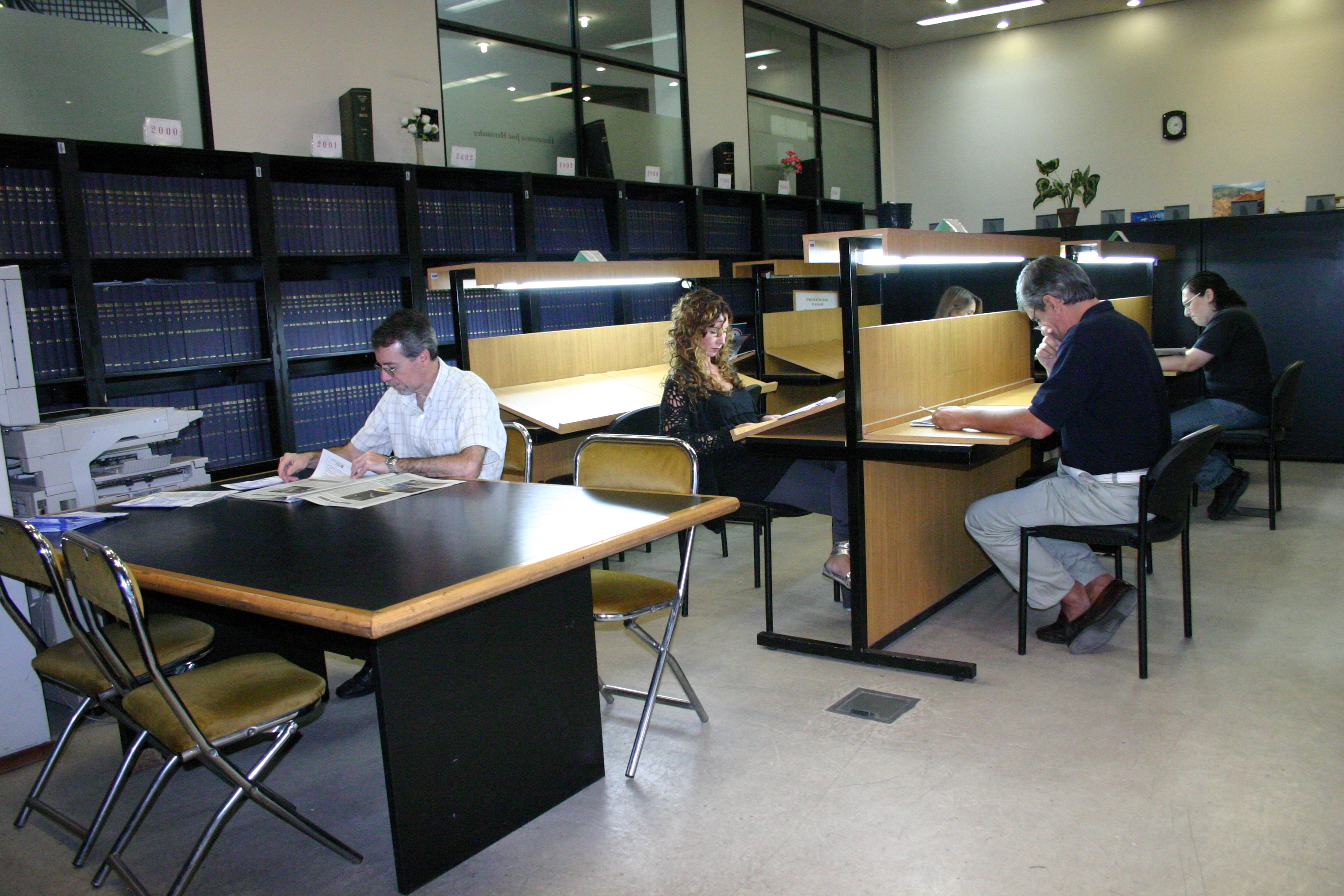 Hemeroteca del Palacio de la Legislatura de la Ciudad de Buenos Aires